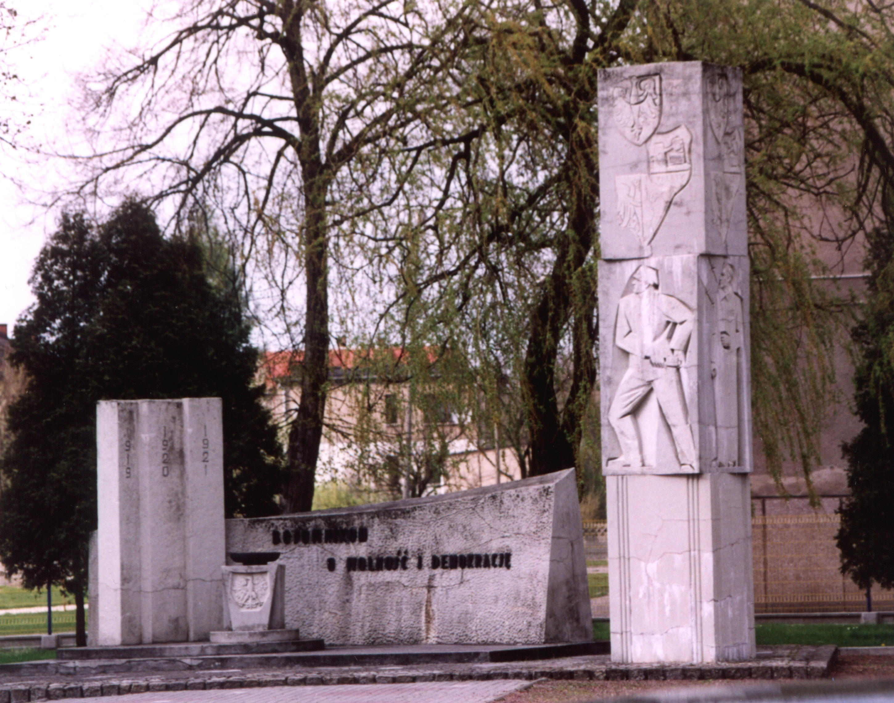 Pomnik w Kaletach